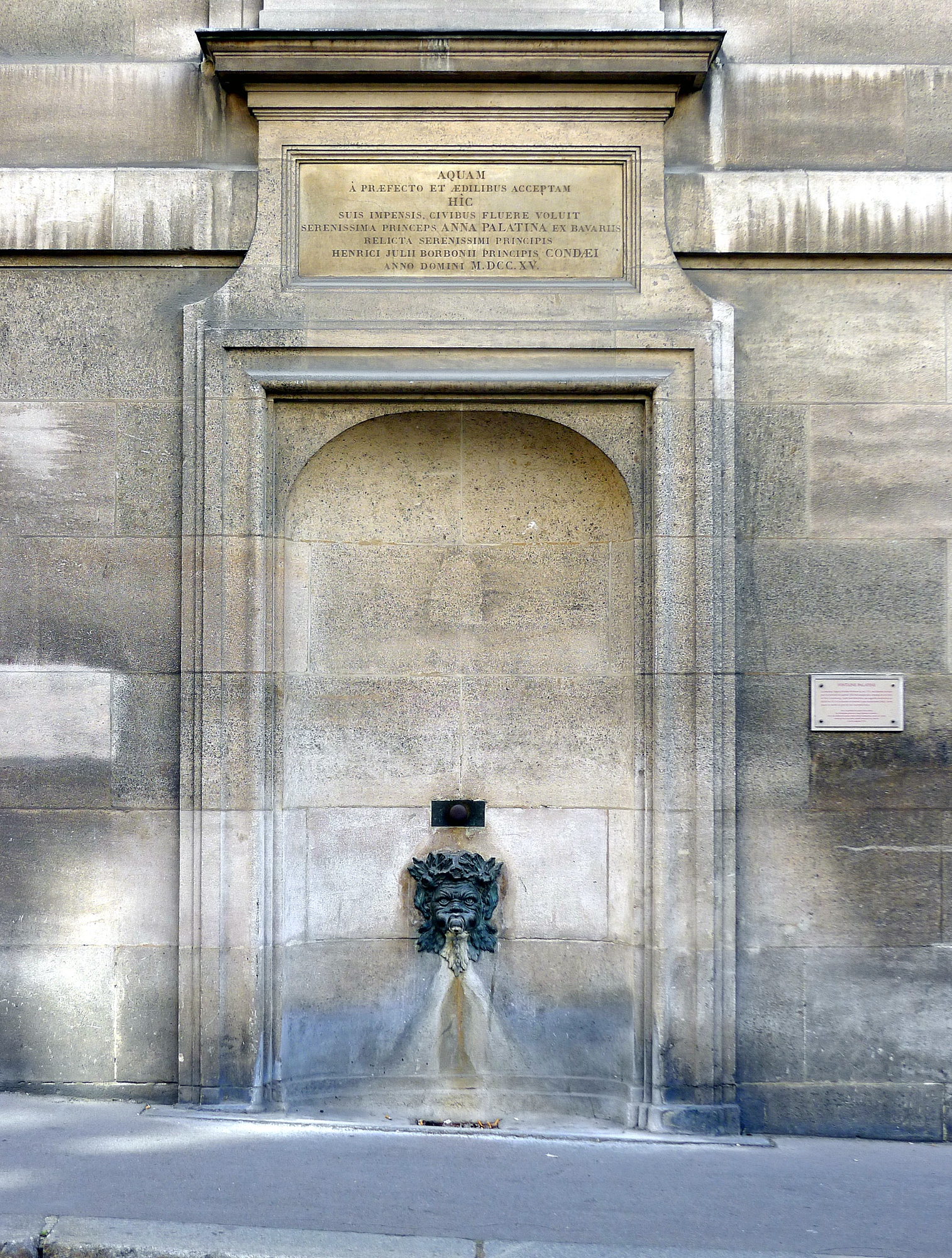 Rue Garancière (n°12 fontaine de 1715) - Paris VI .